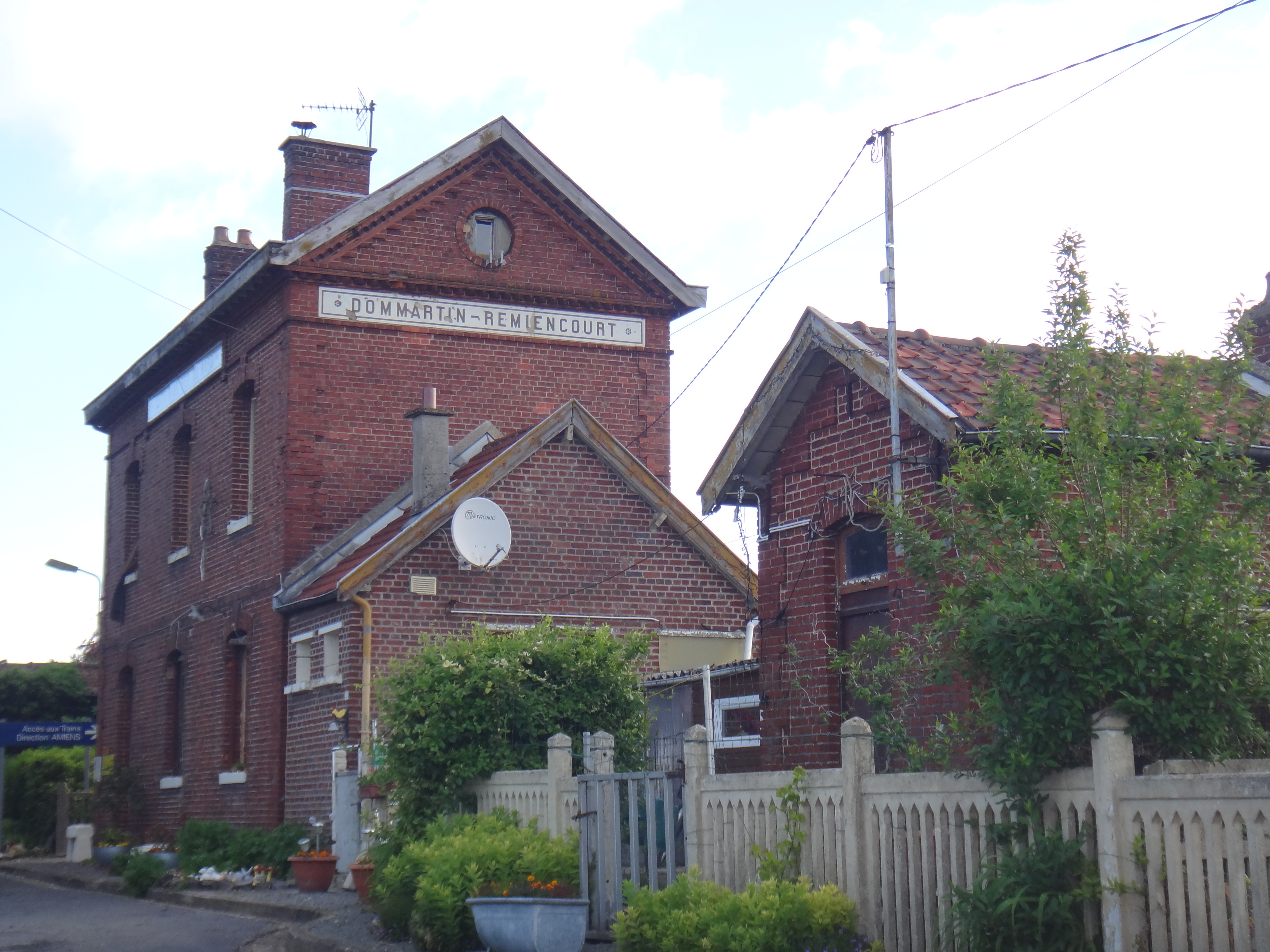 Gare de Dommartin - Remiencourt, Somme, France, en mai 2014.